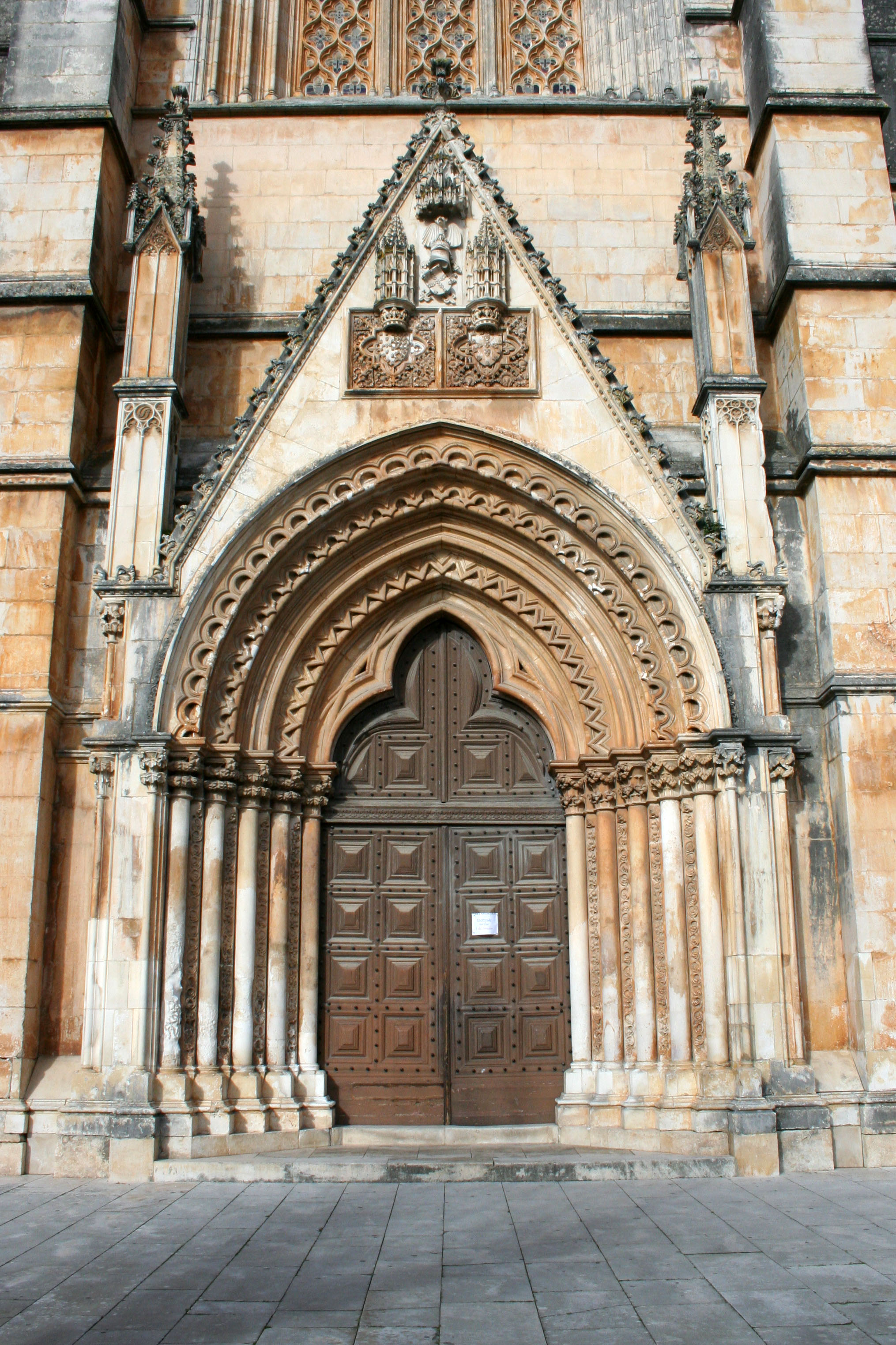 Portal lateral com Gablete (decorativa derivada do frontão triangular e que emoldura ou serve de remate à parte superior das arquivoltas dos portais ou das janelas e outras aberturas das igrejas)